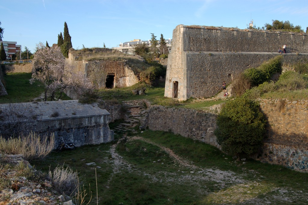 Un racó del castell de Montjuïc a Girona.